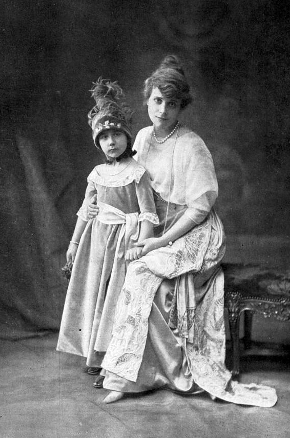 Photograph in Les Modes (cf. Roman d'une garde-robe, p. 174, note 9)